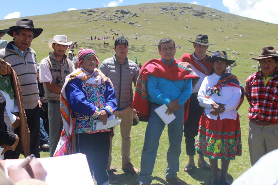 Edgar Ochoa en Paruro